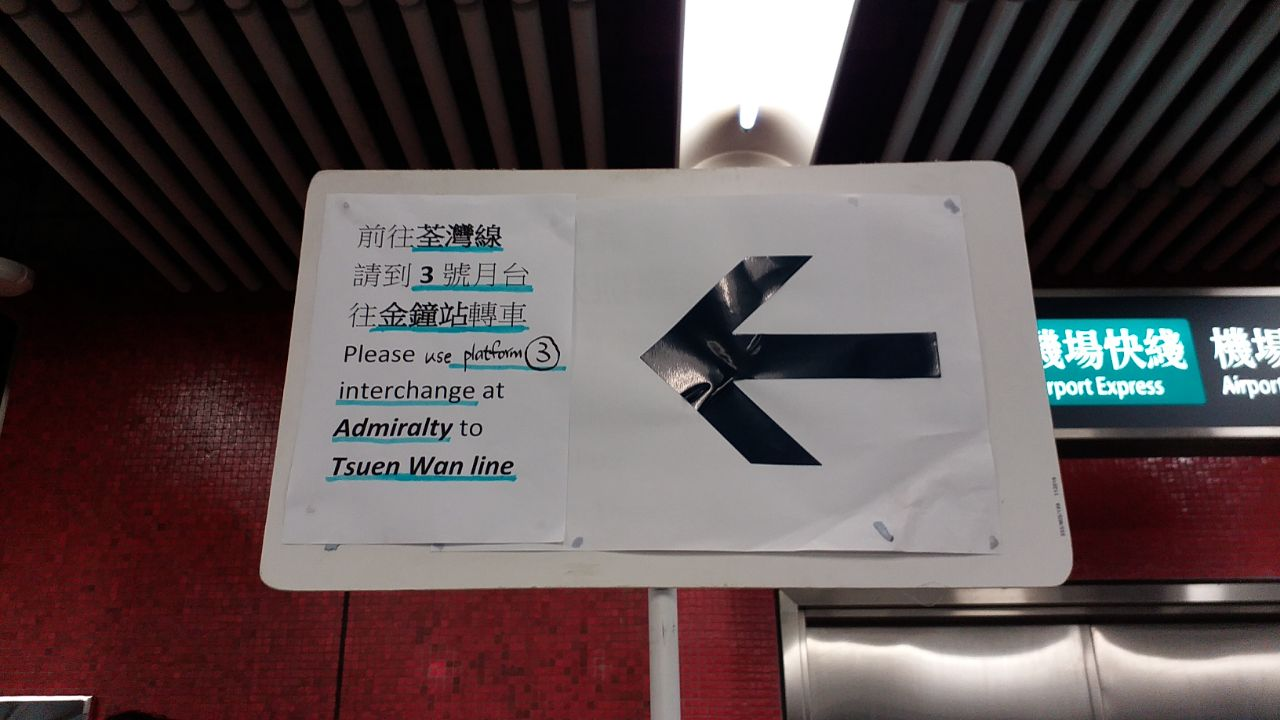 中文（香港）: 港鐵中環站列車相撞事故期間，中環站L4層4號月台的臨時方向指示。